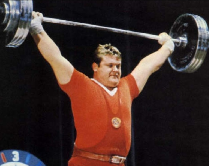 FIGURINA OLYMPIA PANINI NUMERO 247 ZHABOTINSKY SOLLEVAMENTO PESI